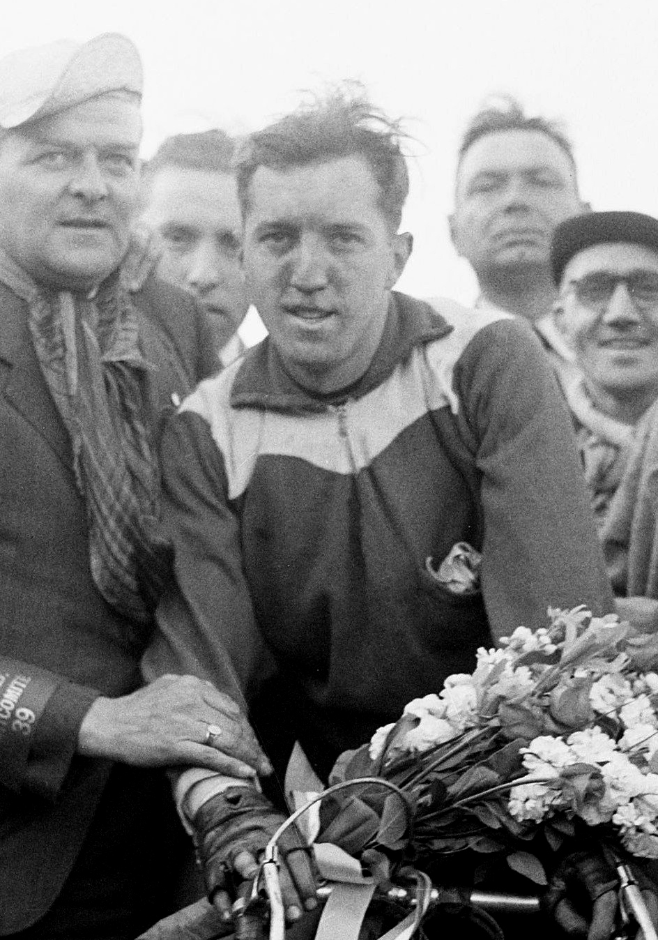 Ronde van Nederland: Kerkrade-Tilburg. Winnaar Van Kerckhoven met bloemen